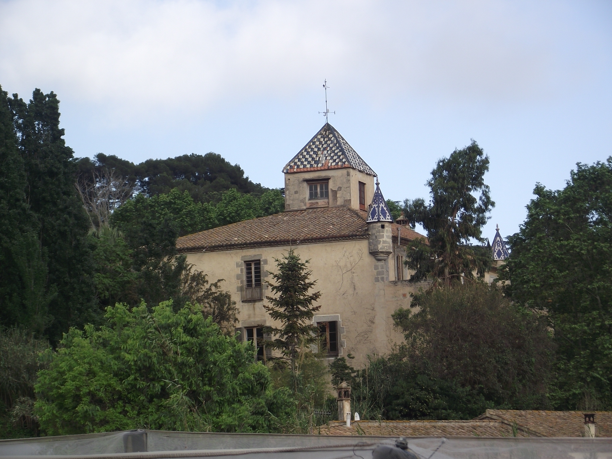 Can Wertheïm (Teià)